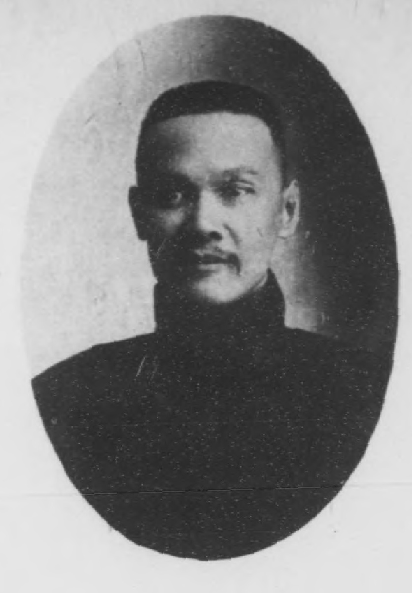 光緒甲辰科進士小像